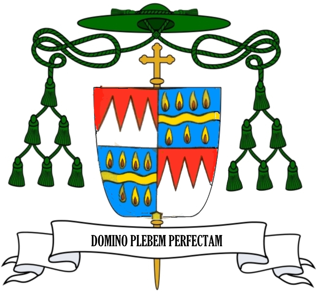 Wappen Josef Stangl, Bischof von Würzburg 1957-1979